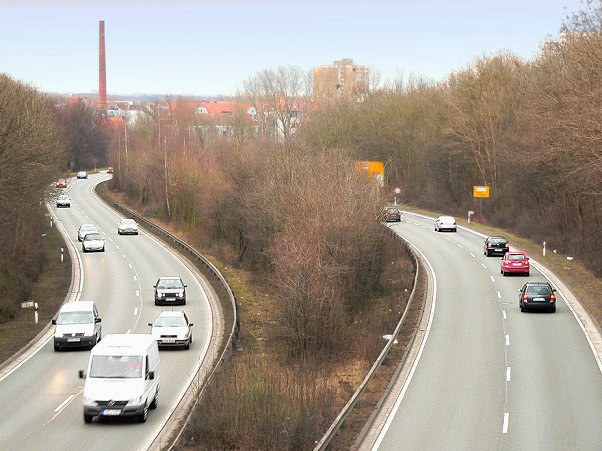 Westschnellweg Hannover